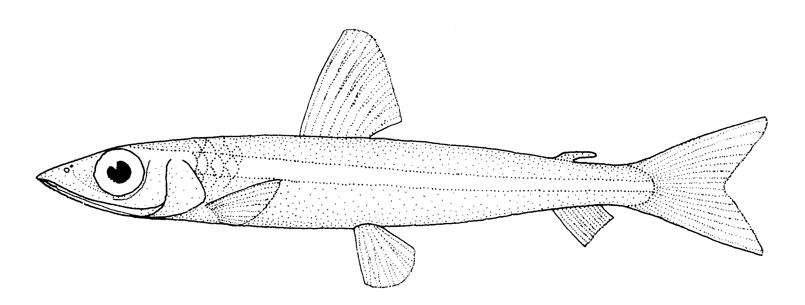 Argentina elongata (no common name)